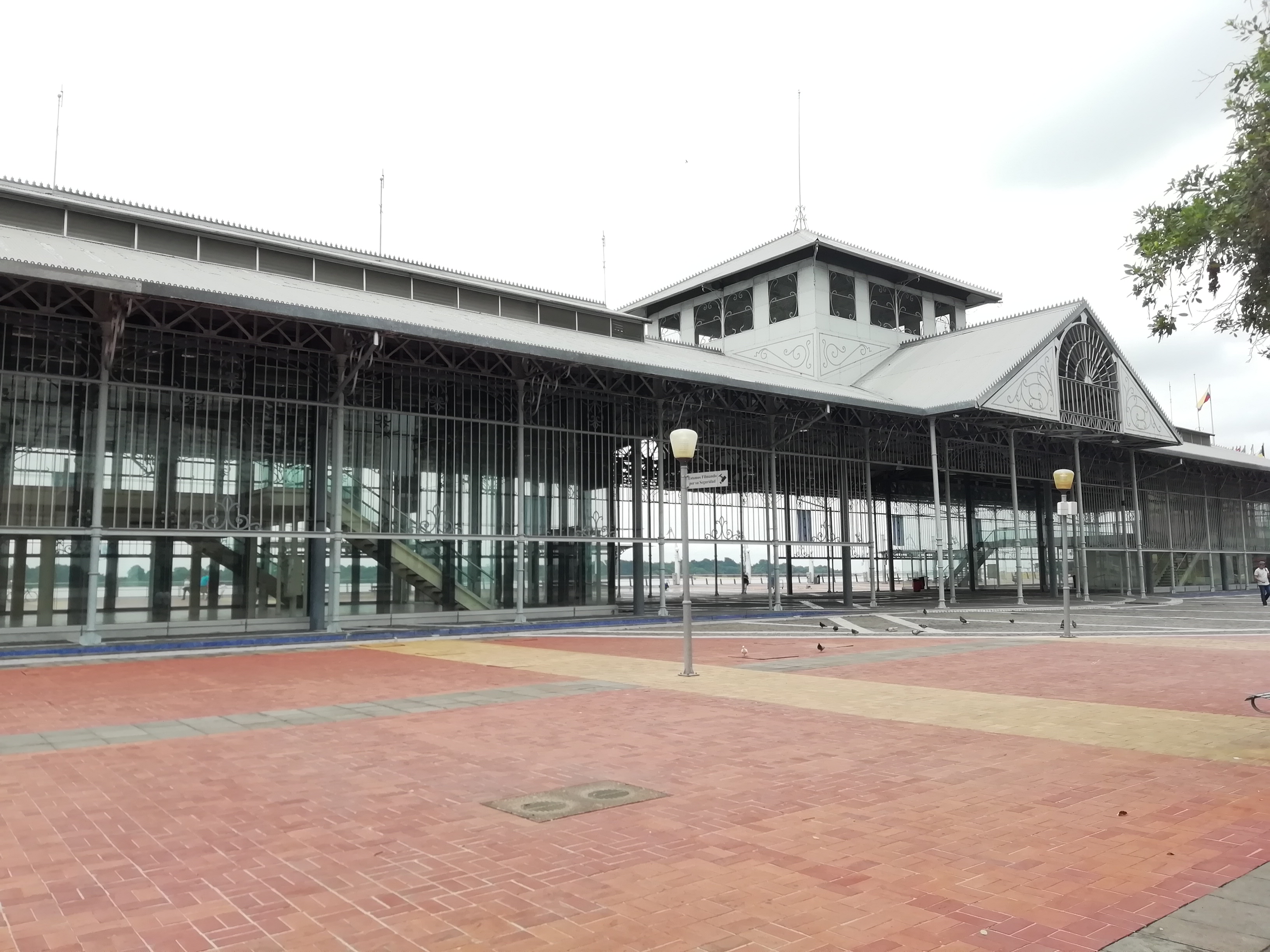 Palacio de Cristal, sitio en el que antaño se realizaba la venta de víveres como en cualquier mercado, actualmente es un sitio de exposición y presentación de eventos